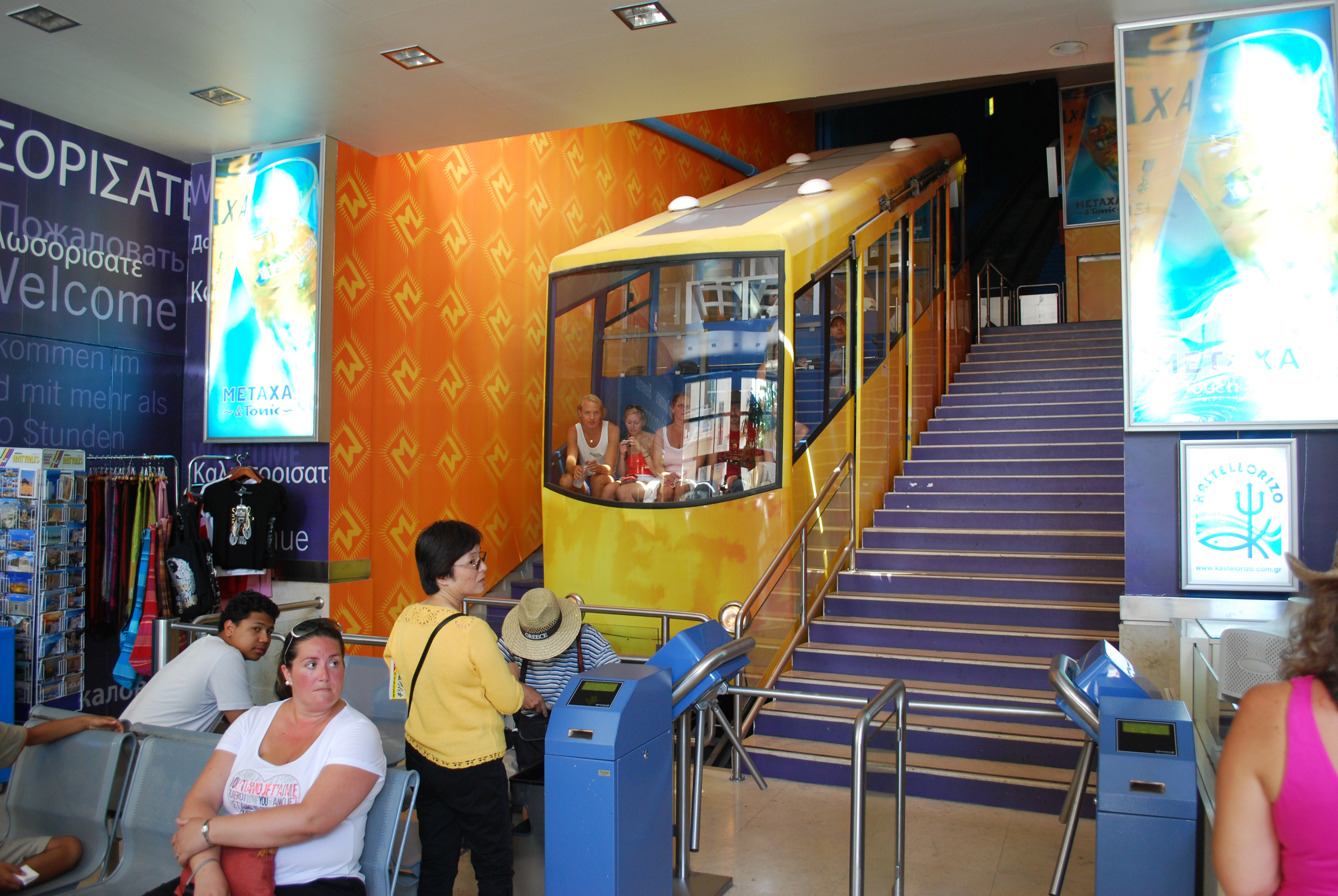 Le funiculaire du Lycabette à Athènes.